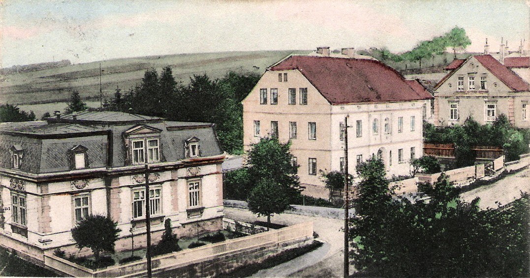 Vila rodiny Frindových v Mikulášovicích na snímku z počátku 20. století